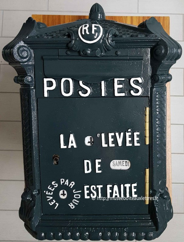 Boite aux lettres de 1901. Fonderie Delachanal dite Mougeotte.